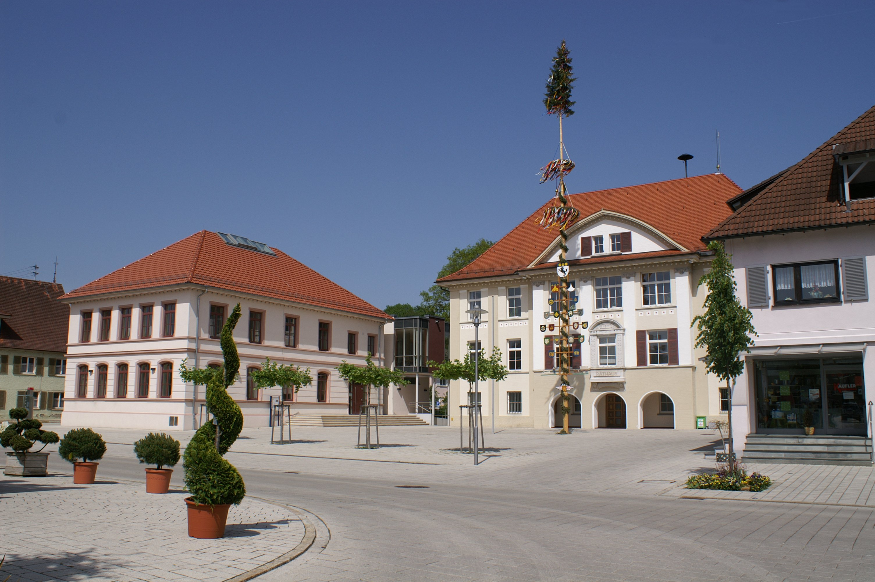 Dorfmitte von Allmendingen im Alb-Donau-Kreis mit Rathaus (Bildmitte) und Bürgerhaus (links)